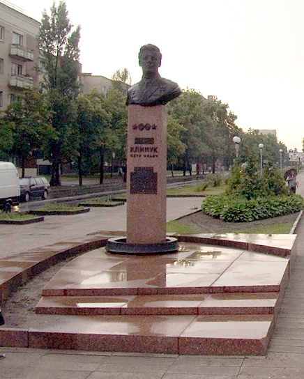 Bulvár kosmonautů v běloruském Brestu